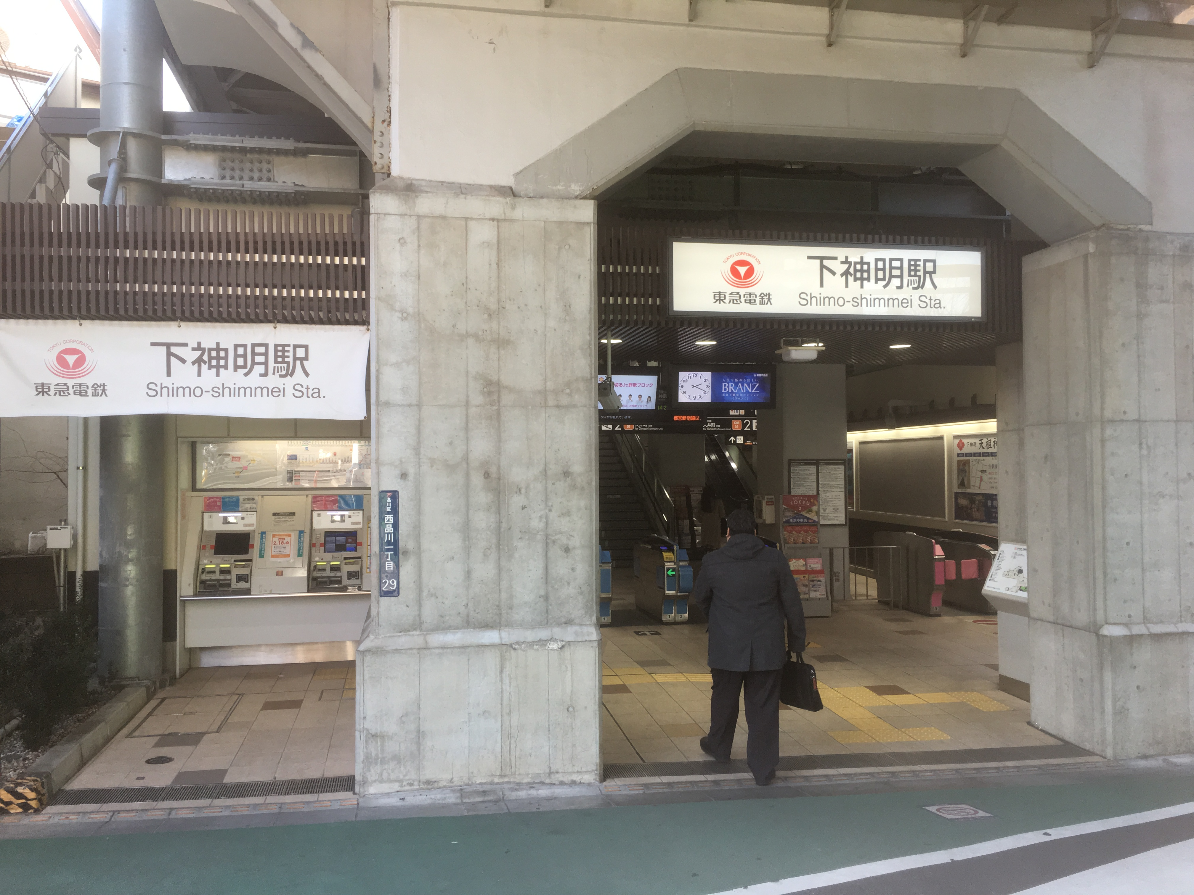 Shimo-Shimmei Station (下神明駅)